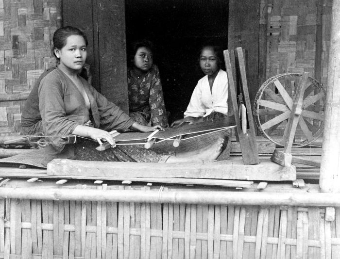 Repronegatief. Sarongweefster uit Bandoeng, Java